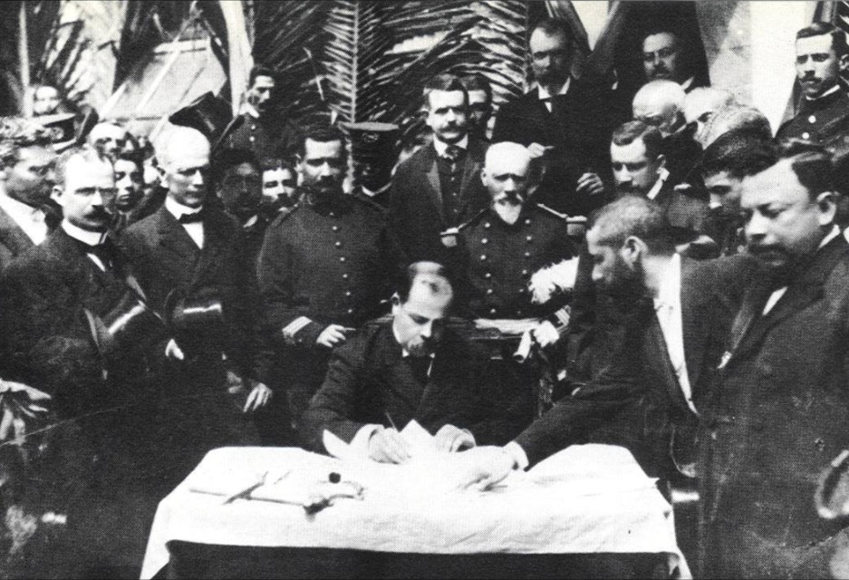 El presidente Estrada Cabrera firmando decretos del ejecutivo.